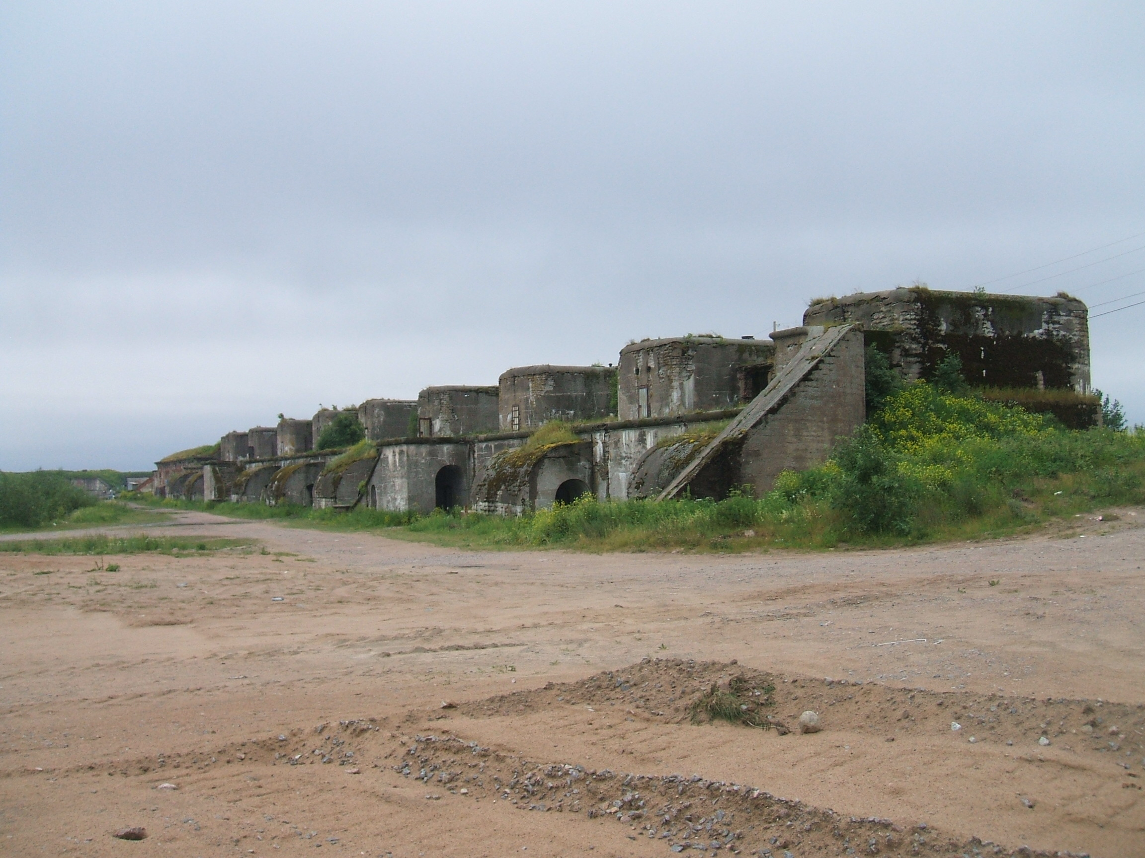 Форт Константин в Кронштадте